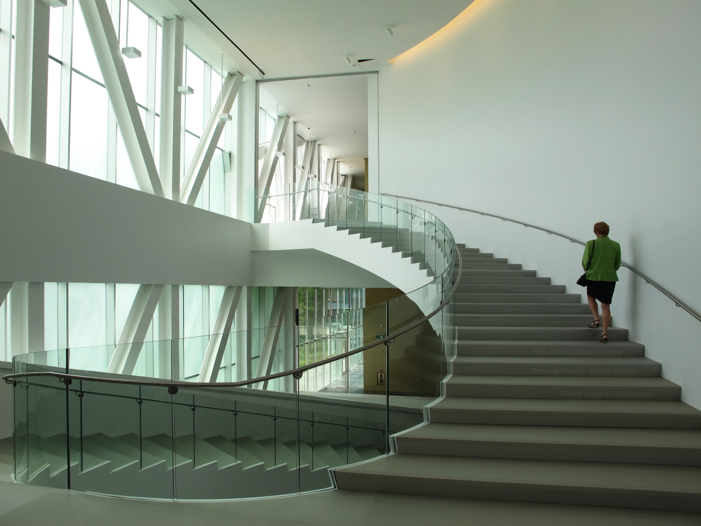 Musée national des beaux-arts du Québec, Pavillon Pierre-Lassonde, escalier